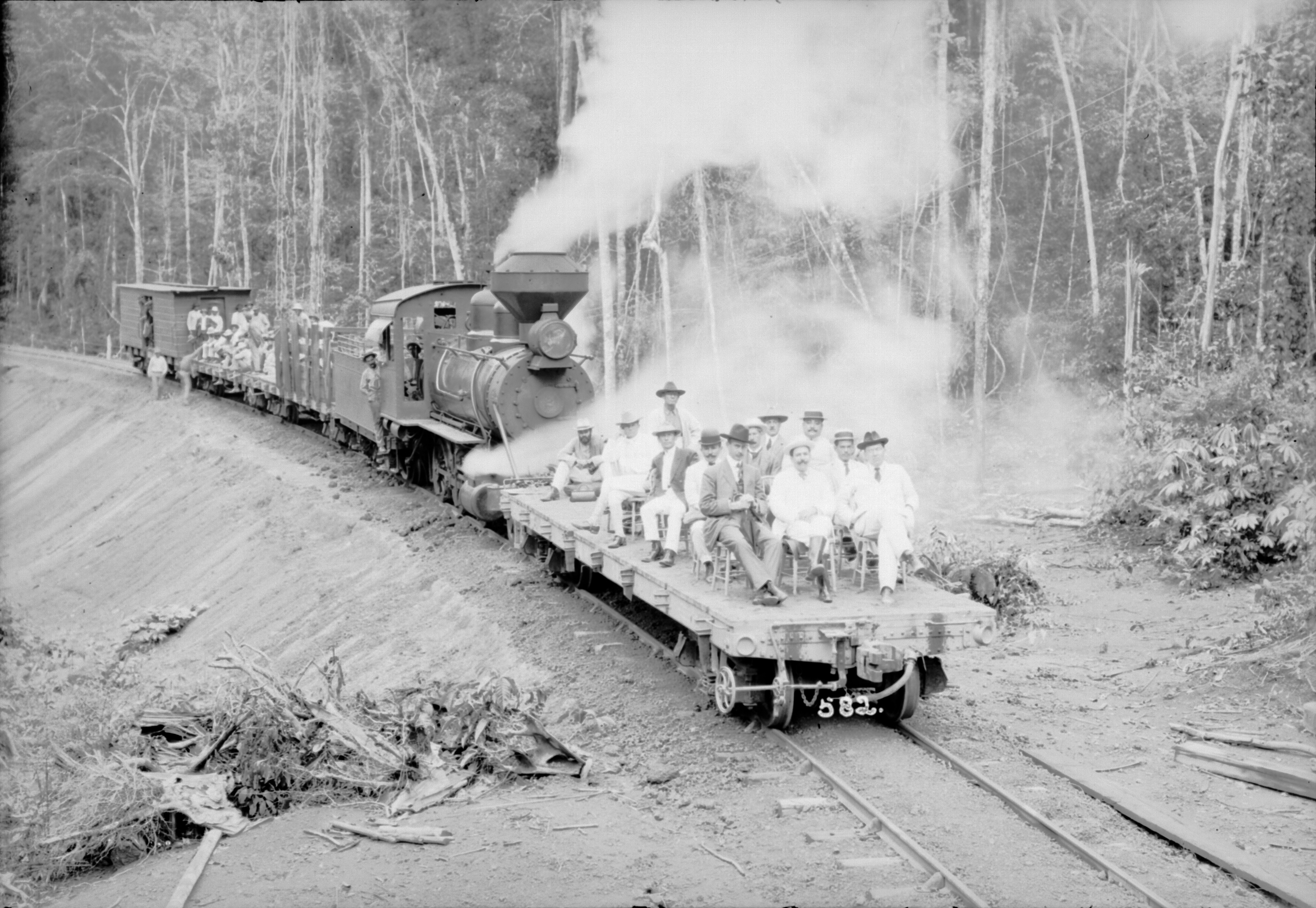 Obra que integra o acervo do Museu Paulista da USP. Coleção Dana Merrill.